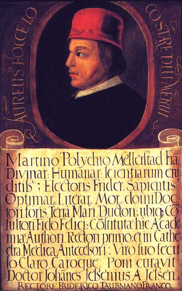 Martin Pollich von Mellerstadt Öl auf Holz Ende des 16. Jahrhunderts von Johannes Jessenius veranlasst.